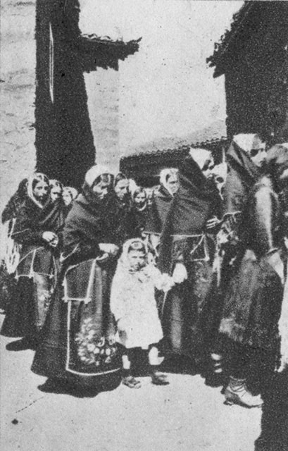 Maragatas - León - España Turística y Monumental / Cuarto Álbum / Las Bellezas de Castilla / Región Leonesa - Cromo 70 x 50 Sepia